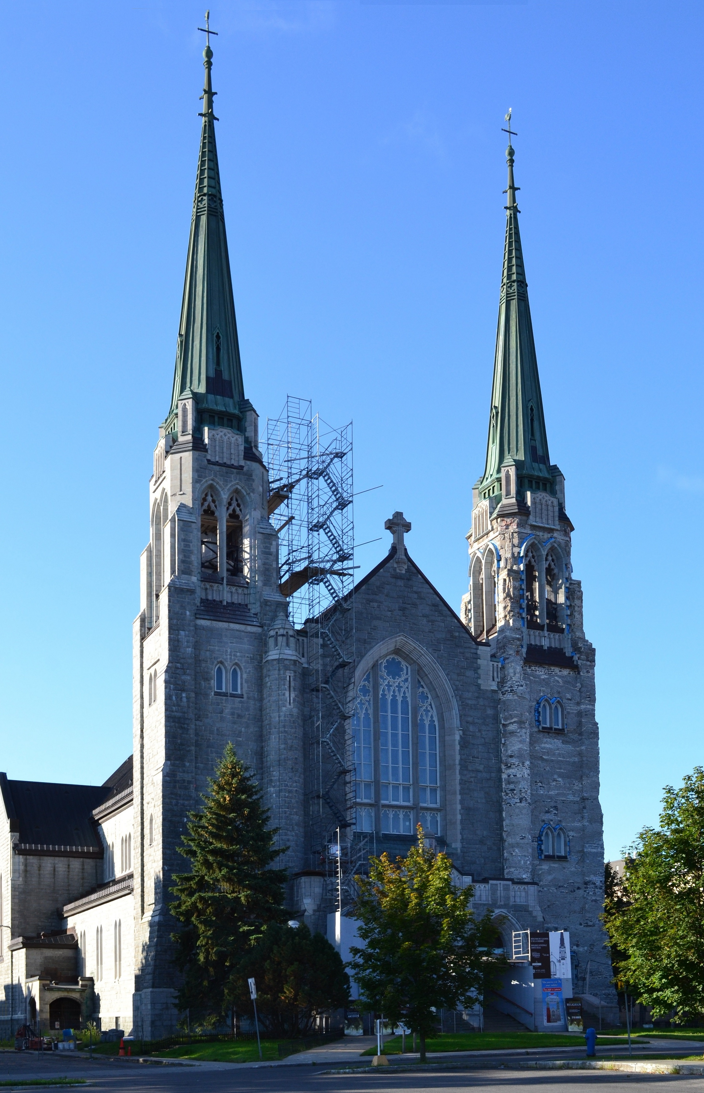 Face avant de la cathédrale de Sainte-Cécile à Salaberry-de-Valleyfield, Québec